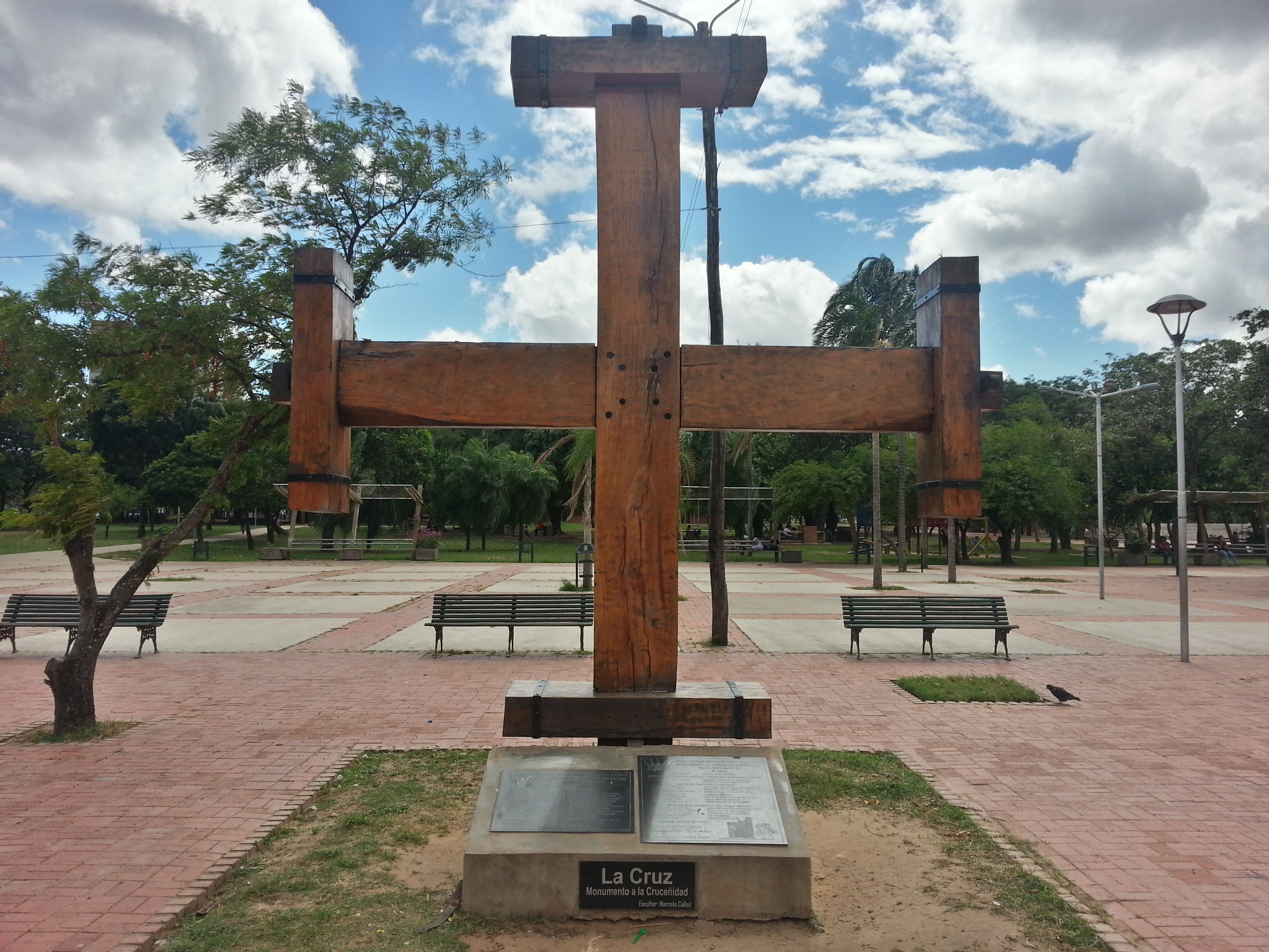 Monumento Cruz de la Cruceñidad en Santa Cruz, Bolivia. This medium shows the protected monument with the number S/00-012 in Bolivia.